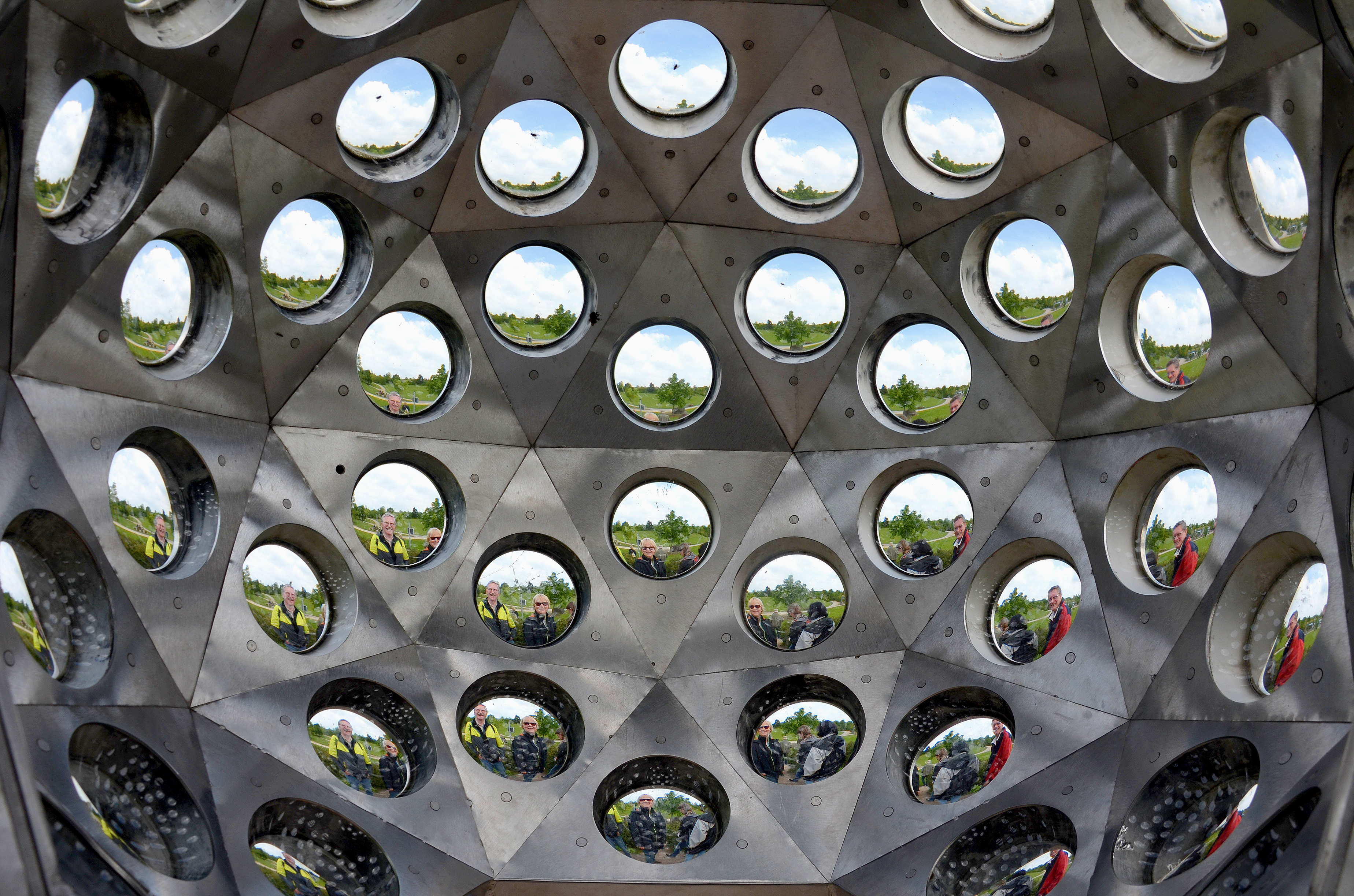 Einige Teilnehmer der vom Freundeskreis Hannover organisierten Fahrradtour vom Maschsee zum Park der Sinne, hier gesehen aus dem 2004 von Andreas Rimkus geschaffenen Insektenauge ...